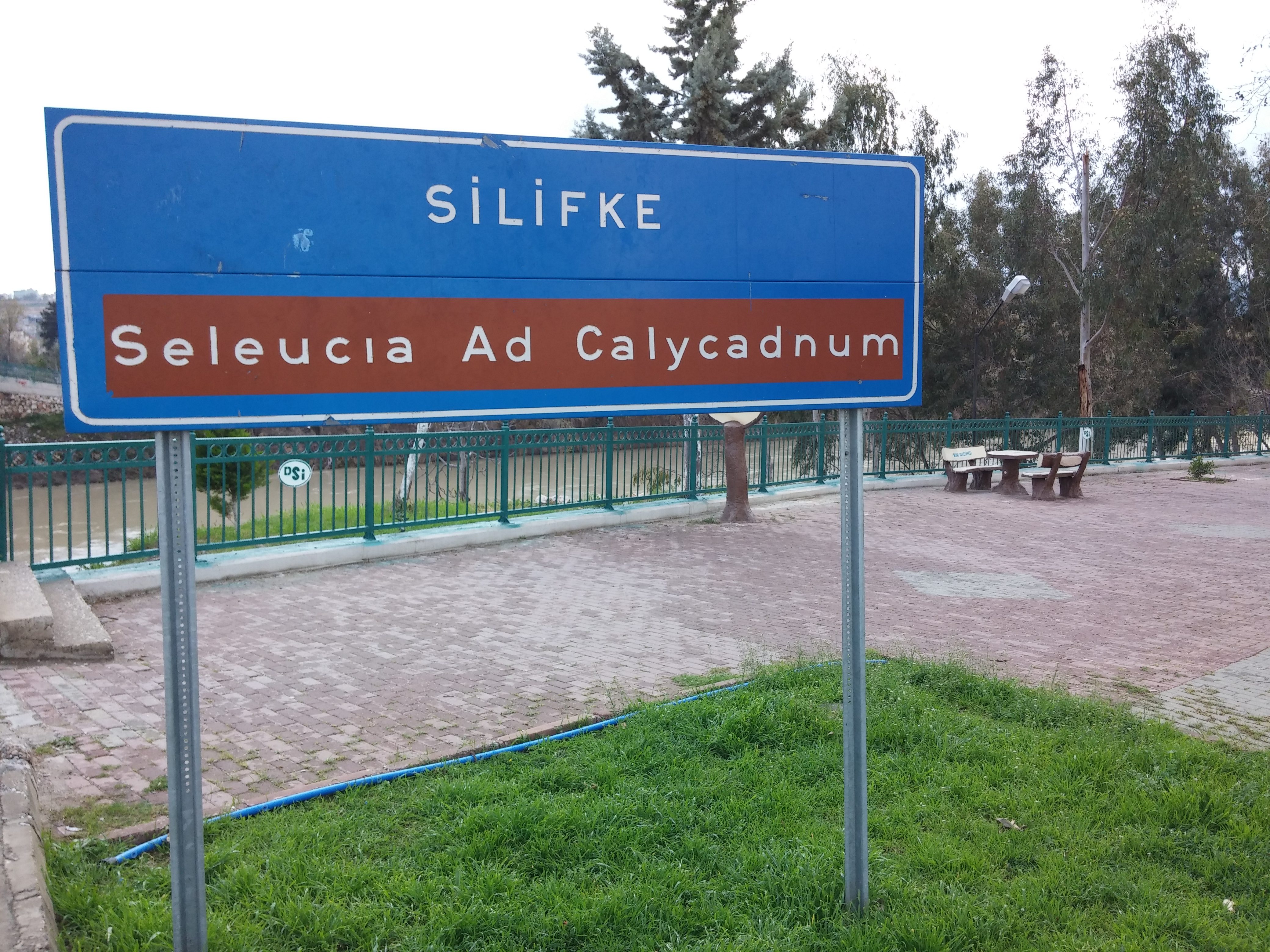 Günümüzde Silifke şehrinin bulunduğu antik Seleukia ad Calycadnum şehrinin giriş sınırını gösteren tabela.